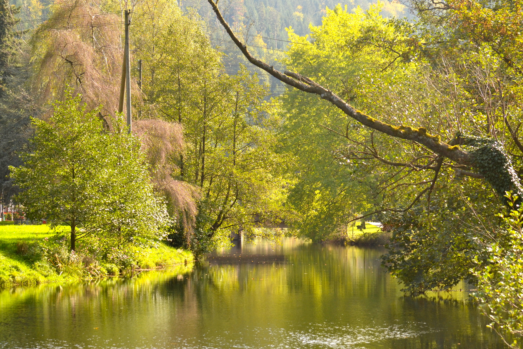 Enz river.